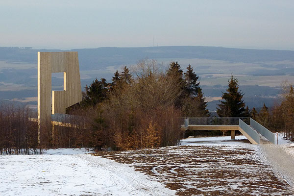 Skulptur "Windklang" des Bildhauers Christoph Mancke auf dem Erbeskopf